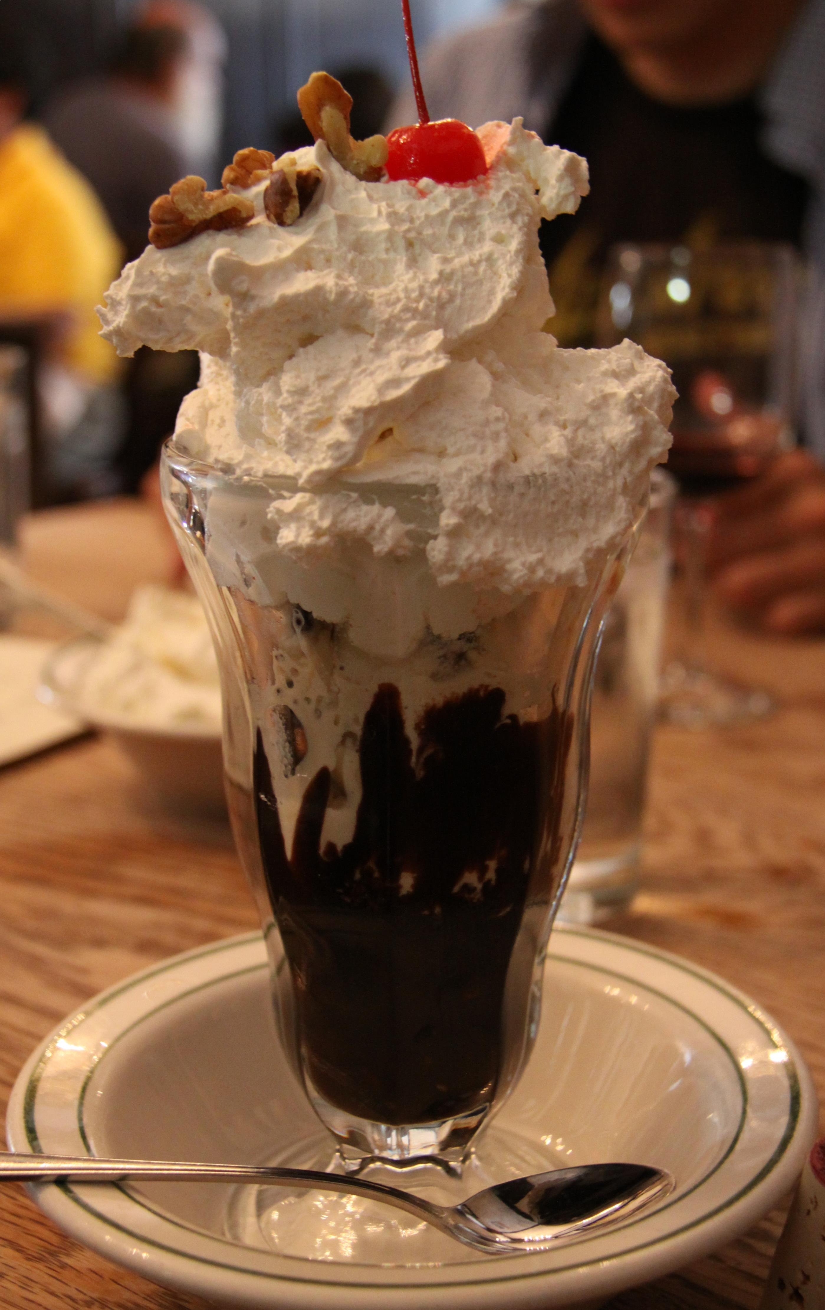 ピータールーガのHolly Cow という名のデザート。 モカアイスとバニラアイスの周りにチョコレートを流し込み、大量の生クリームを上から乗っけた 製品。 驚きのあまり「Holly Cow!!」という言葉を発する人がおおいことからこのネーミングとか・・・ 5人頼んで、珍しく私は真っ先に食いきれた。ほかは・・・ひどい状況。ギブ続出。 ちなみに、「残したら厨房な？」とおっちゃんは言ってたww menu